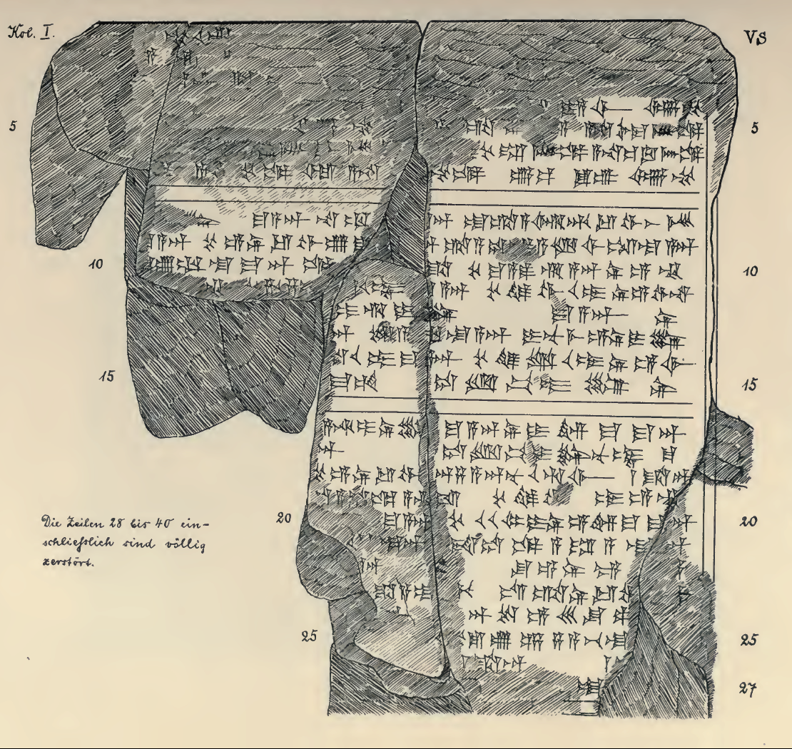 List Tuszratty do Amenhotepa III w języku huryckim – autografia.